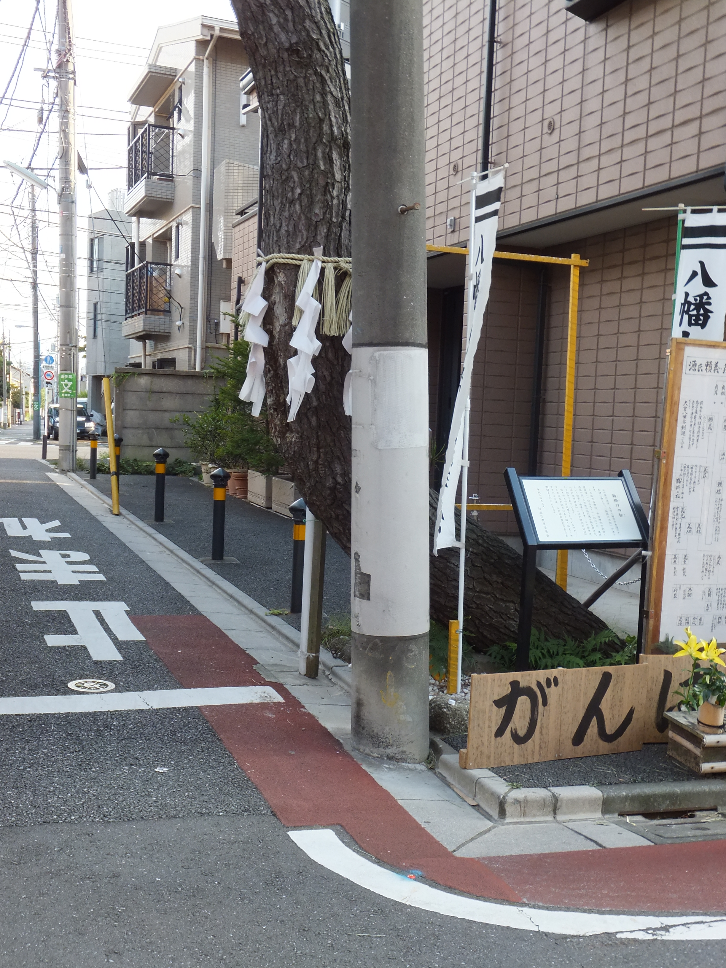 鞍掛けの松